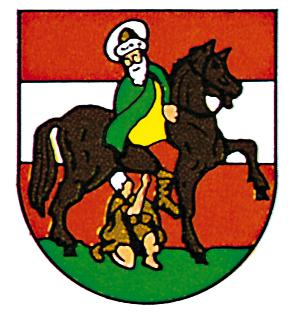 Wappen der Gemeinde Hartberg